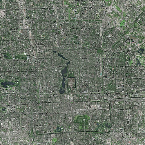 Beijing by SPOT Satellite